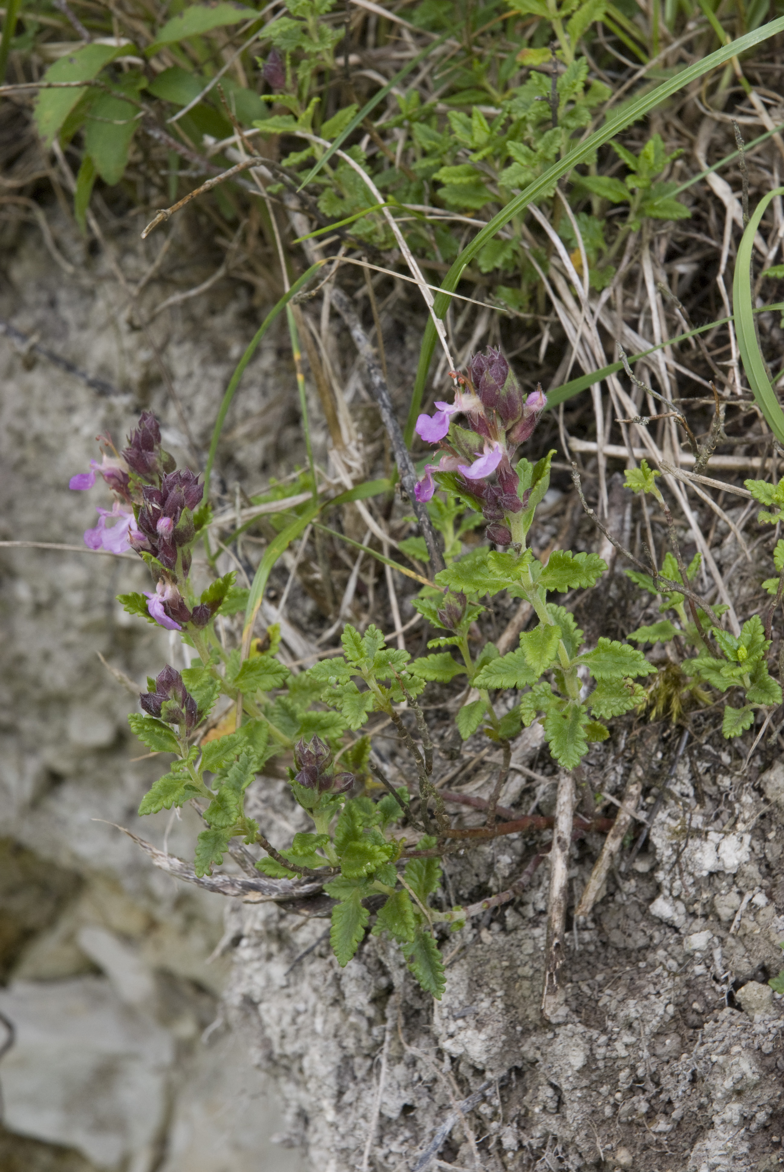 Teucrium chamaedrys-subsp-praecox Bray-sur-Somme (Somme), France